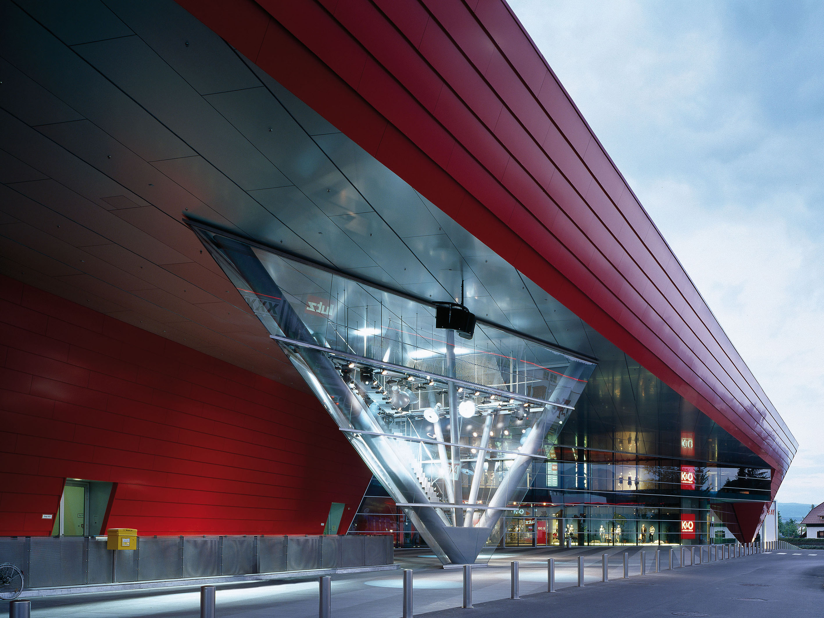 Nachhaltigstes Einkaufszentrum der Welt, SES-Shoppingcenter ATRIO, Villach (Österreich), 2007, ICSC Best of the Best-Award 2009